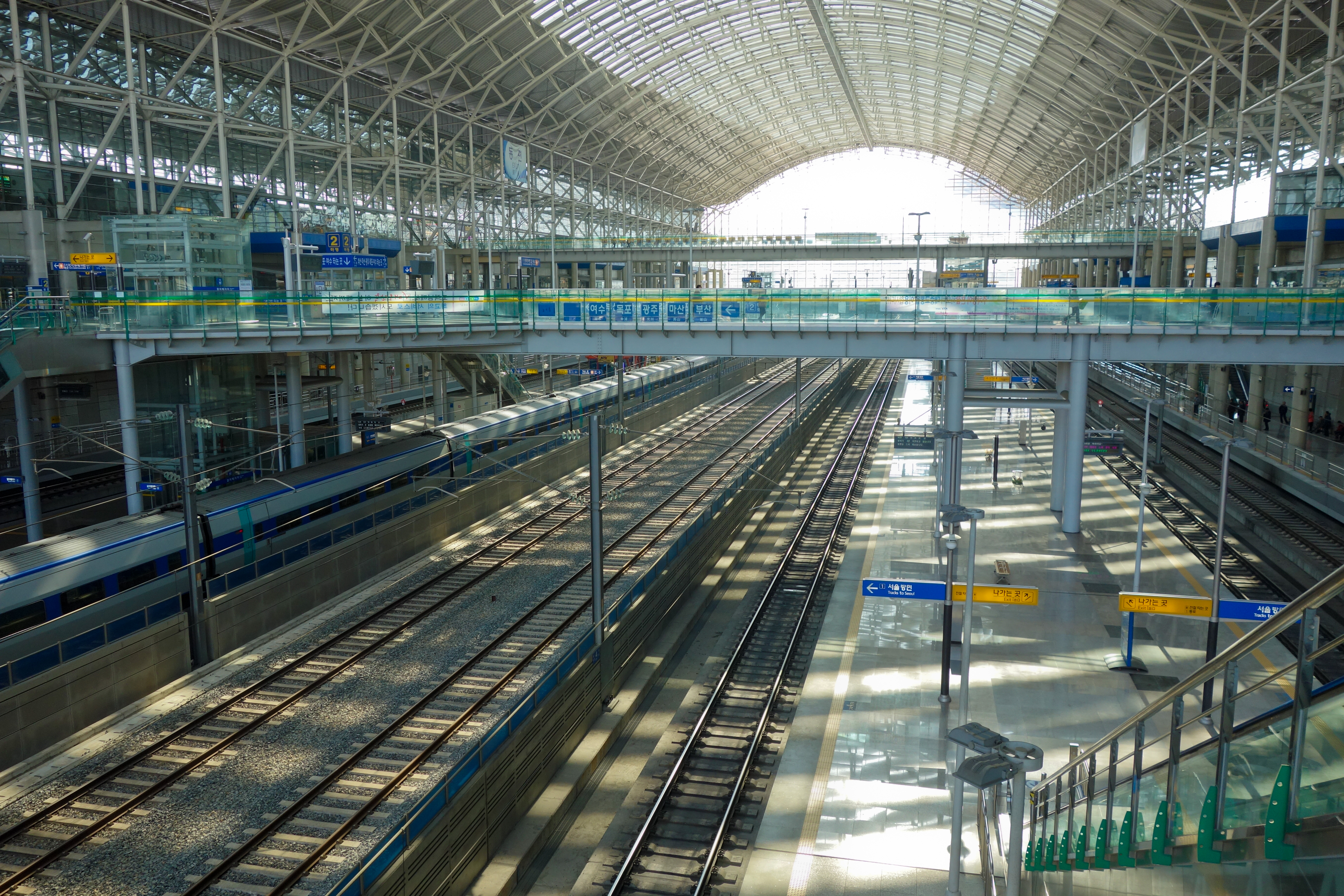 光明駅構内